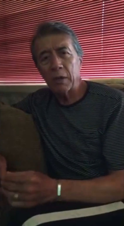 Invitación de José María Napoleón